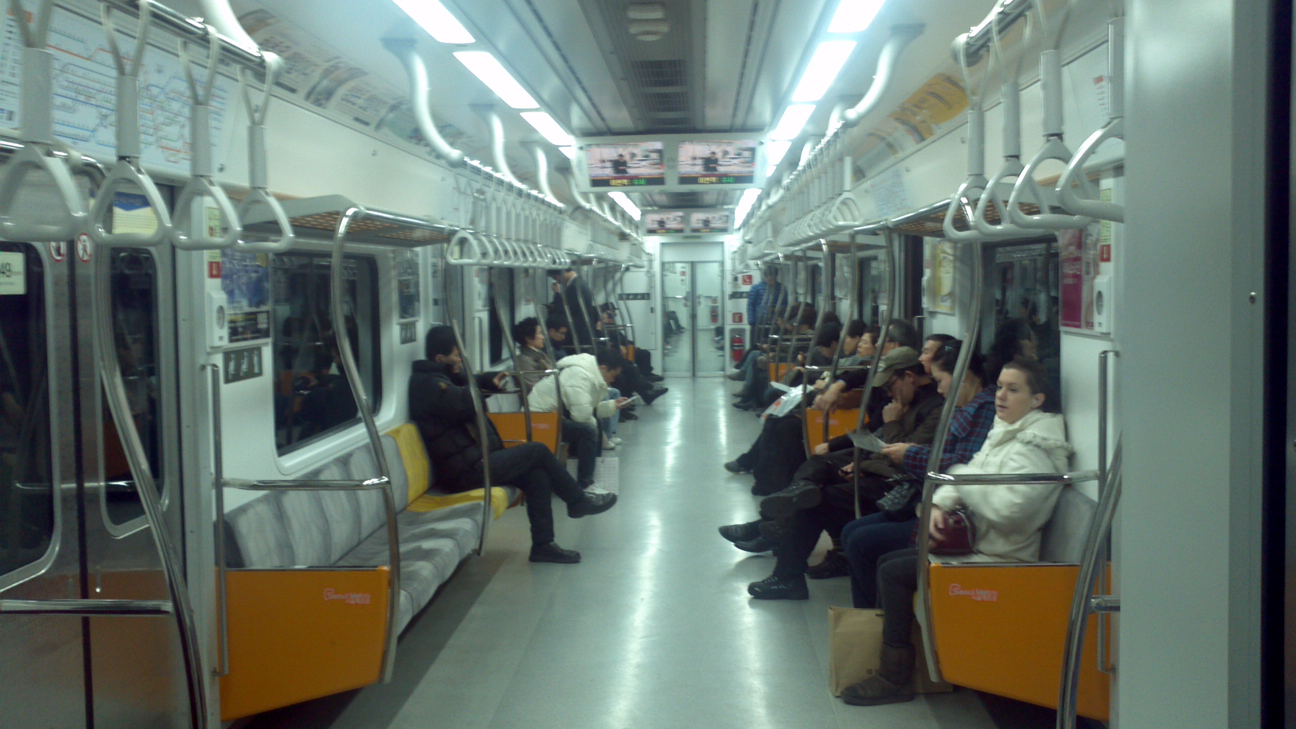 3호선 349편성 열차 내부